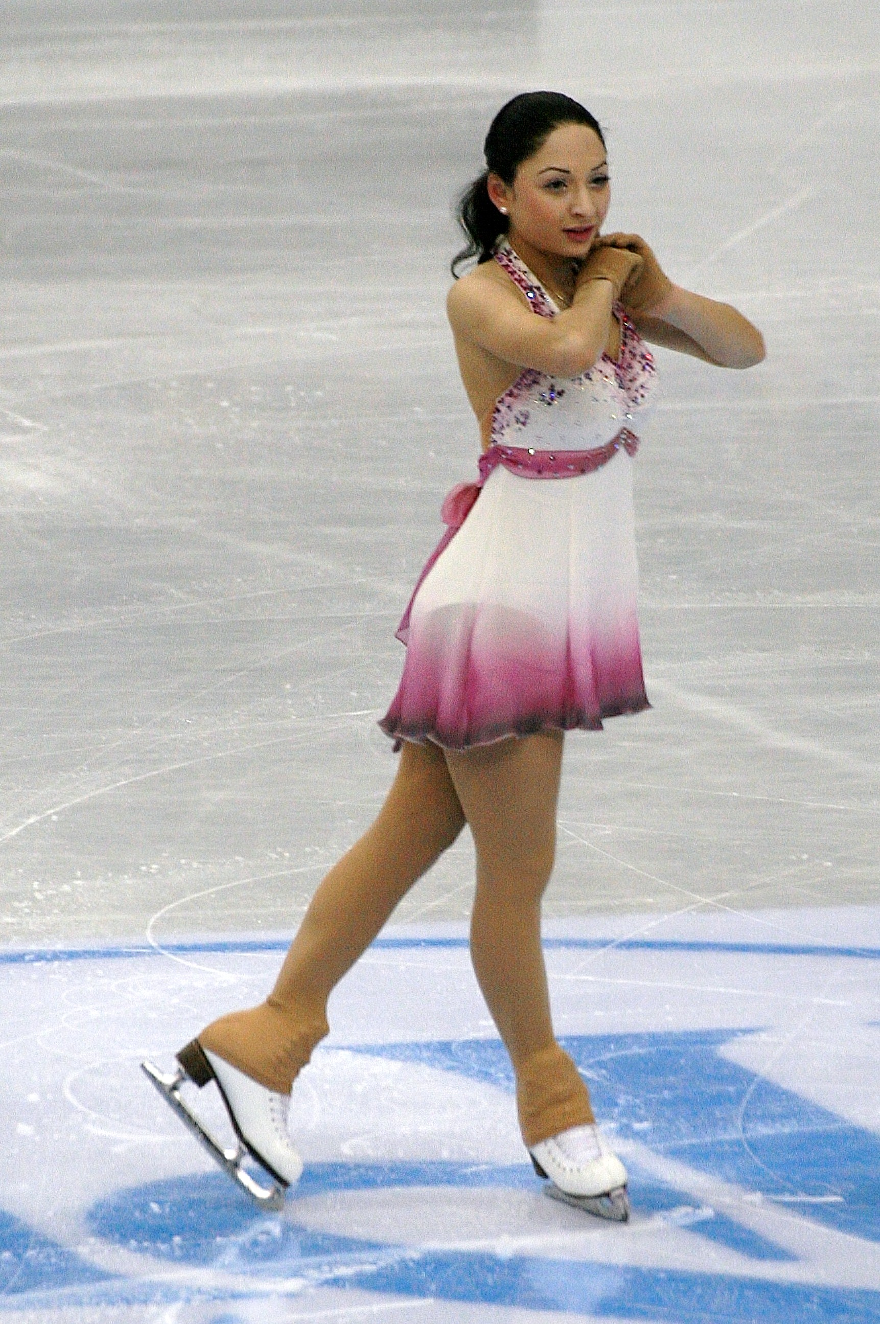 Элене Гедеванишвили (Грузия) на чемпионате мира по фигурному катанию 2012 года.